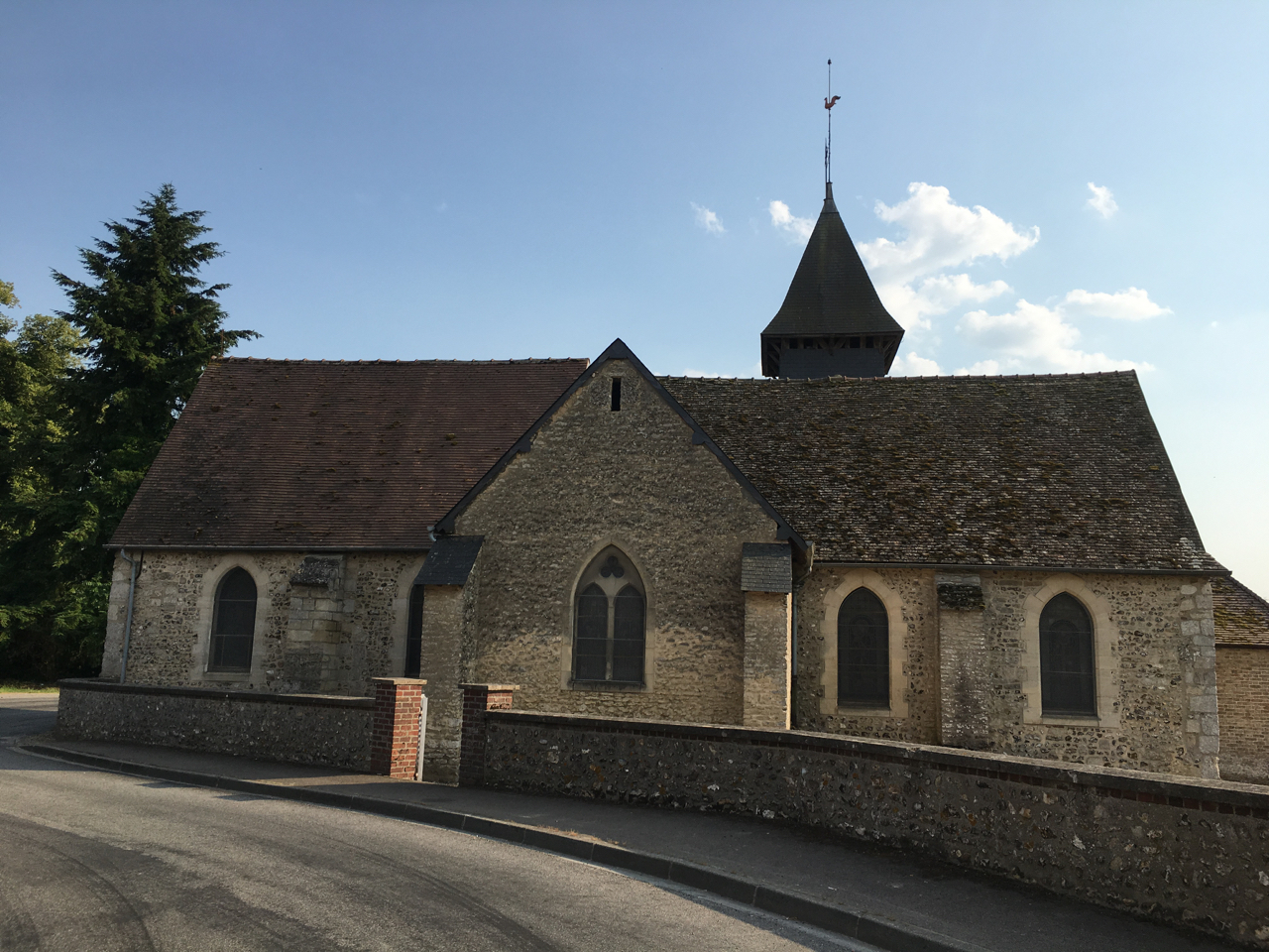 L'église de Mouflaines